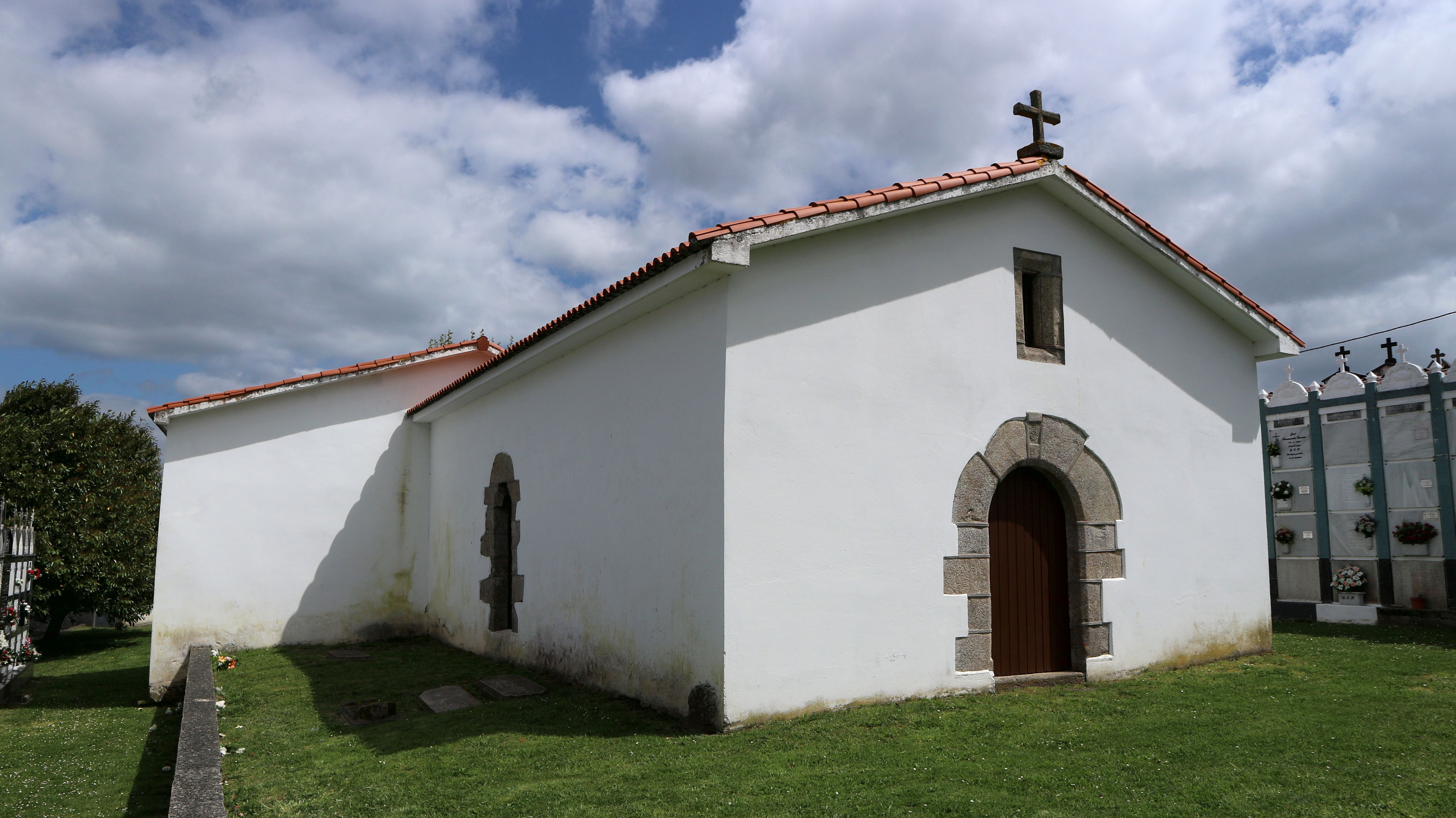 Igrexa de Santiago de Paderne. Paderne, Oza-Cesuras.